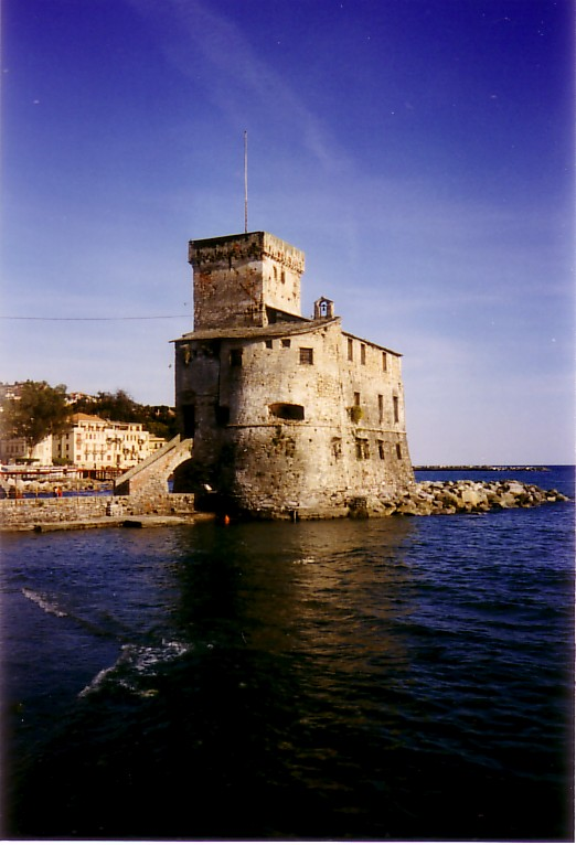 Die Hafenburg von Rapallo (erbaut nach dem Überfall der türkischen Korsaren).